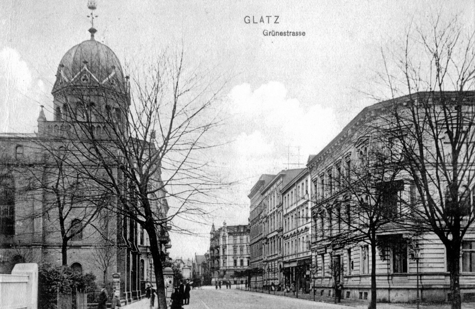 Synagoga w Kłodzku na starej karcie pocztowej